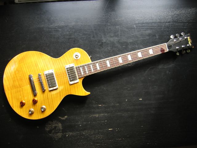 Vintage Lemon Drop. Der Gitarrendesigner Trevor Wilkinson hat sich 2006 bei der Entwicklung der sehr preisgünstigen "Vintage Lemon Drop" von jener legendären Gitarre inspirieren lassen, die Peter Green seit 1966 gespielt und Anfang der 1970er Jahre Gary Moore mehr oder weniger geschenkt hat.